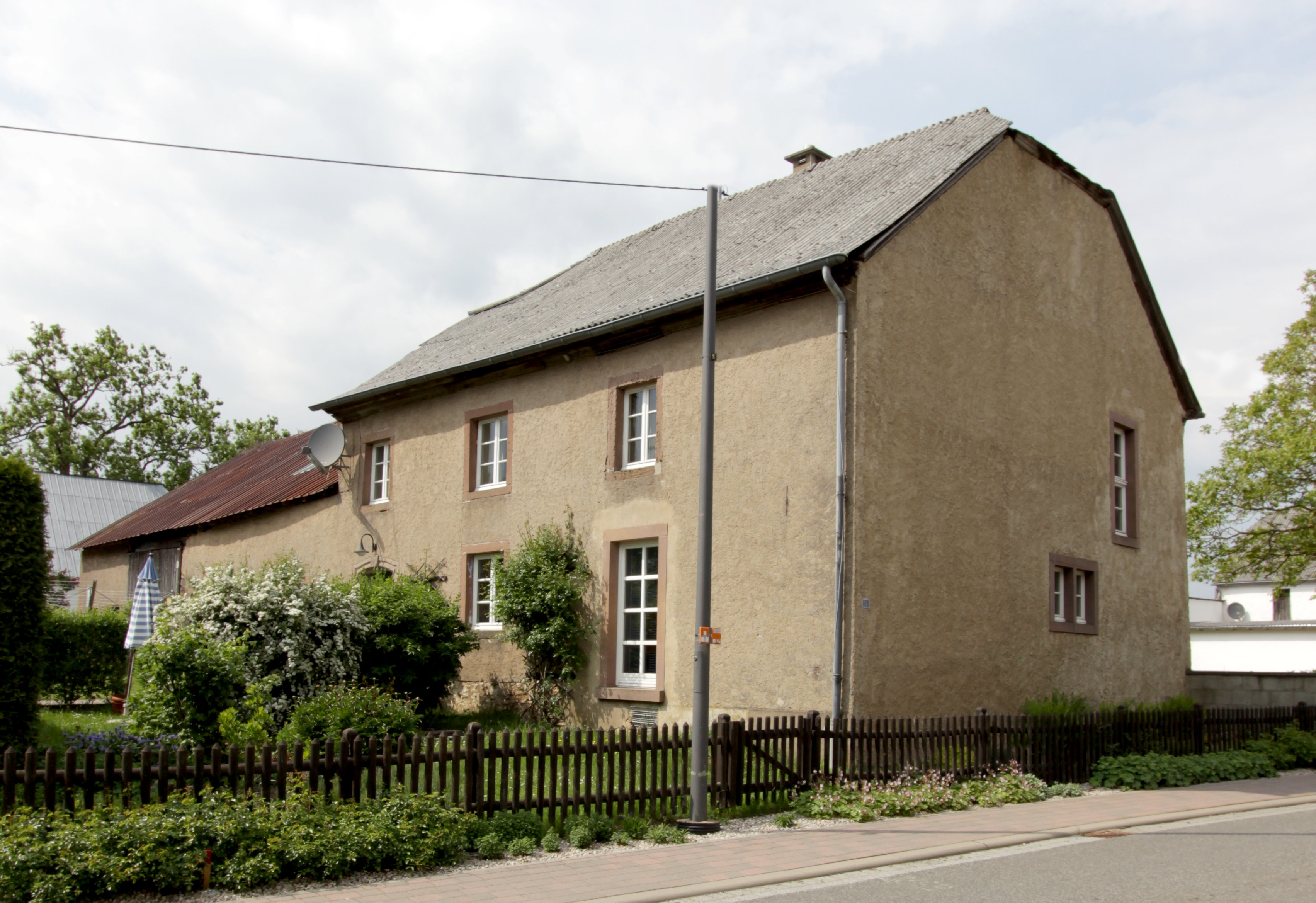 54689 Preischeid, Hauptstraße 18. Streckhof; Wohnhaus, bezeichnet 1780. Aufnahme von 2018.